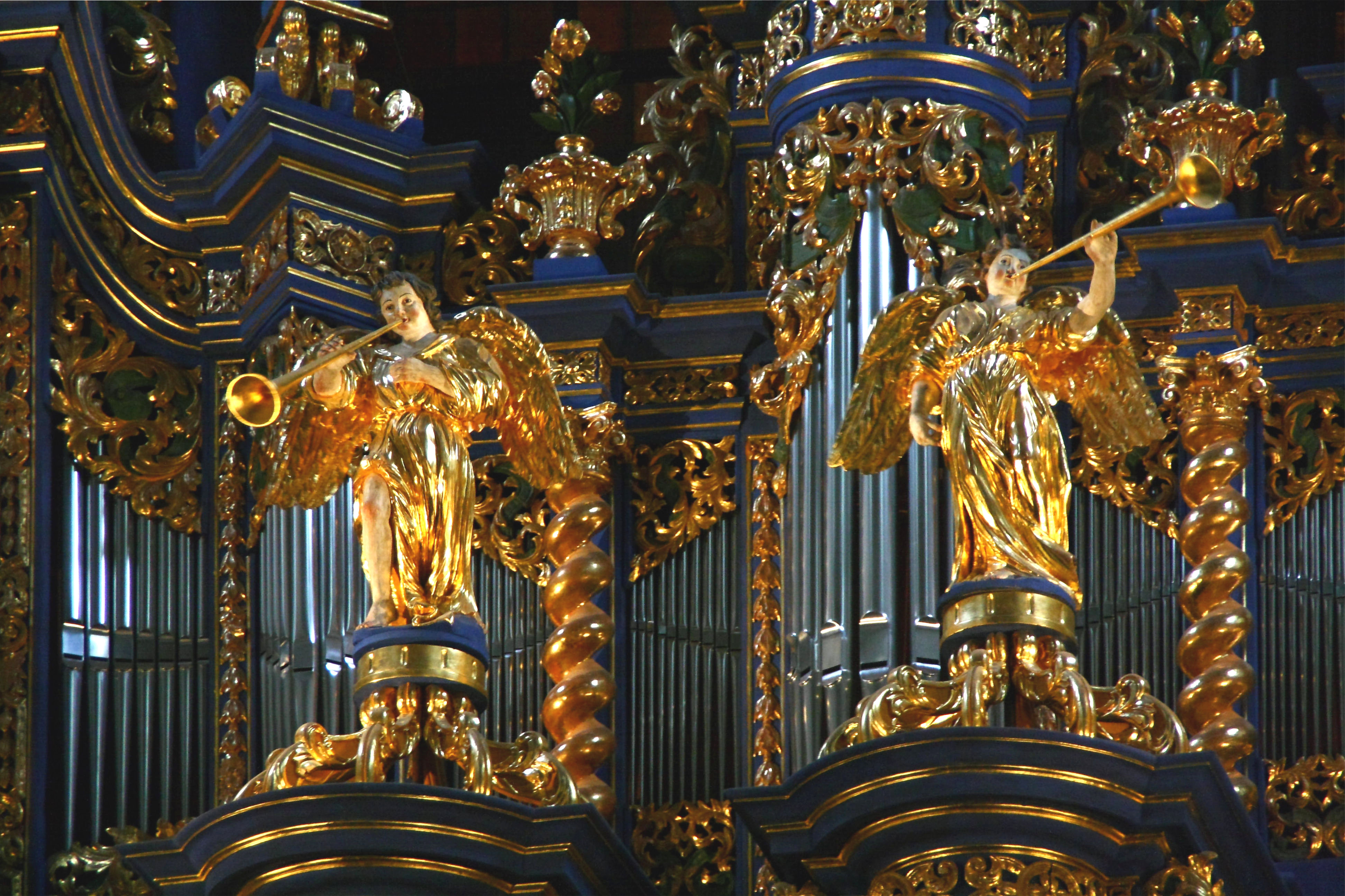 Detail der Orgel in Heilige Linde.